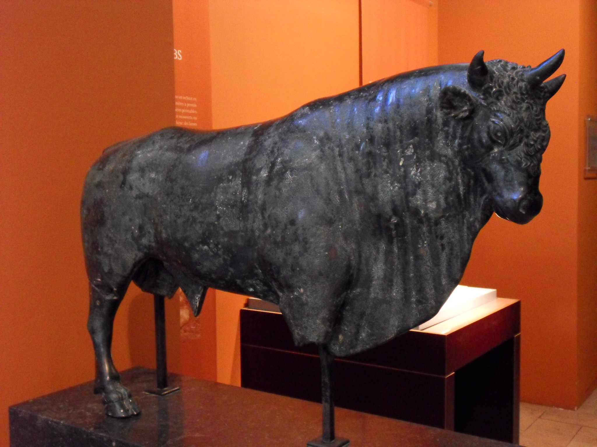 Le taureau d'Avrigney (Haute-Saône). Taureaux à trois cornes dit « Taureau d'Avrigney » (Haute-Saône). Découvert en 1756. Témoignage particulier de l’art cultuel gallo-romain. Musée des beaux-arts et d'archéologie de Besançon